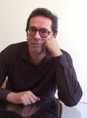 Cesar Aira Wikipedia